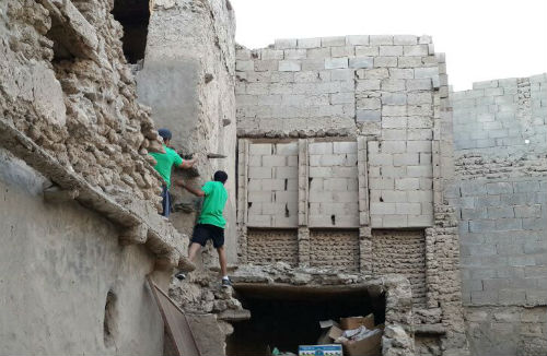 جولة رياضية استطلاعية لمعالم قلعة القطيف.